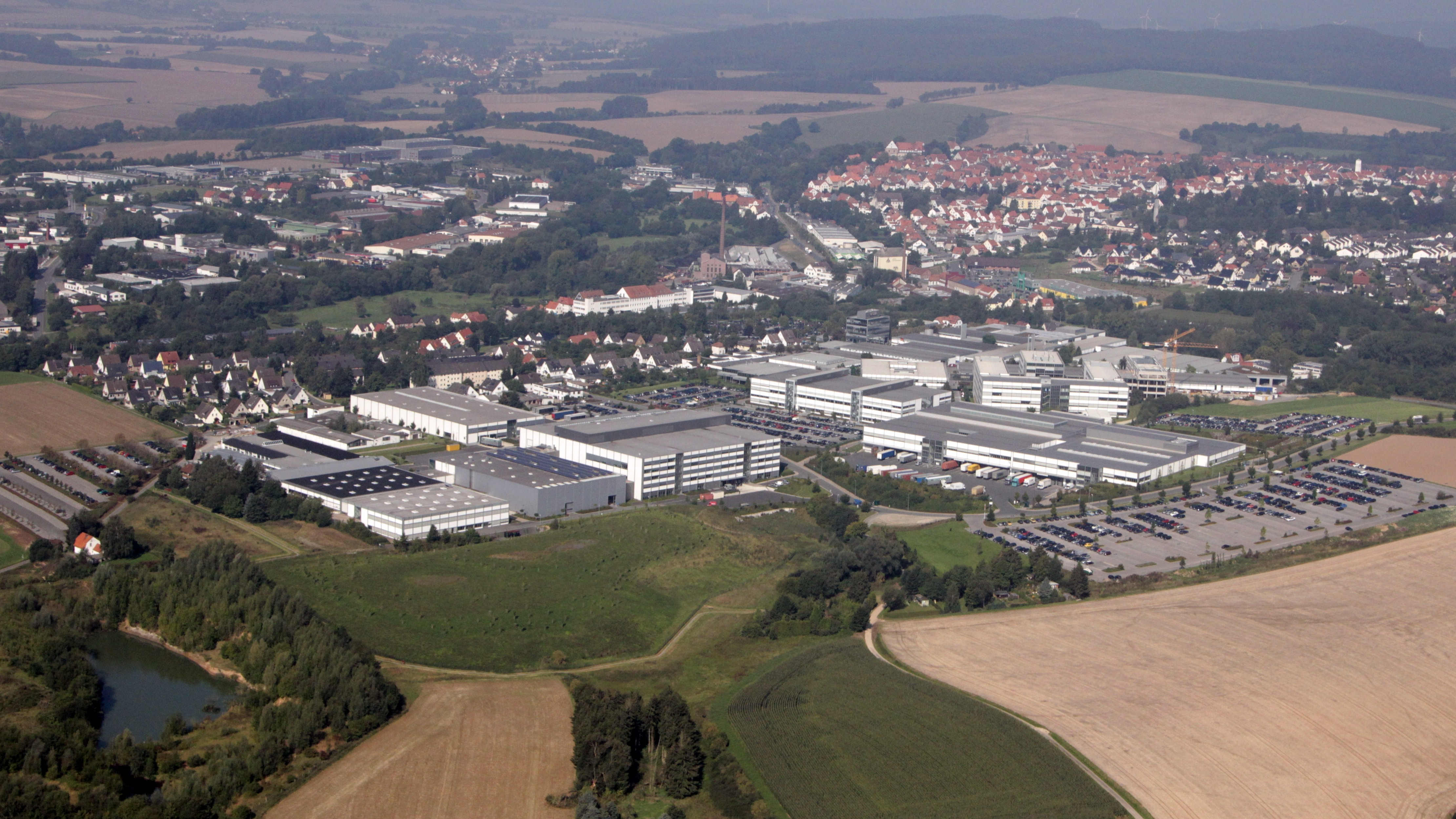 Stammsitz des Unternehmens Phoenix Contact in Blomberg, Deutschland